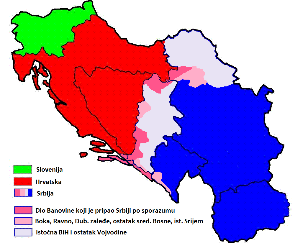 Detalji navodnog sporazuma Pavelić-Stojadinović, prikazana su područja Banovine, Srijema, Boke, sred. Bosne, dubrovačkog Zaleđa, ostatka Vojvodine i BiH koja bi po tom sporazumu trebala pripasti Srbiji... Originalna karta je tu